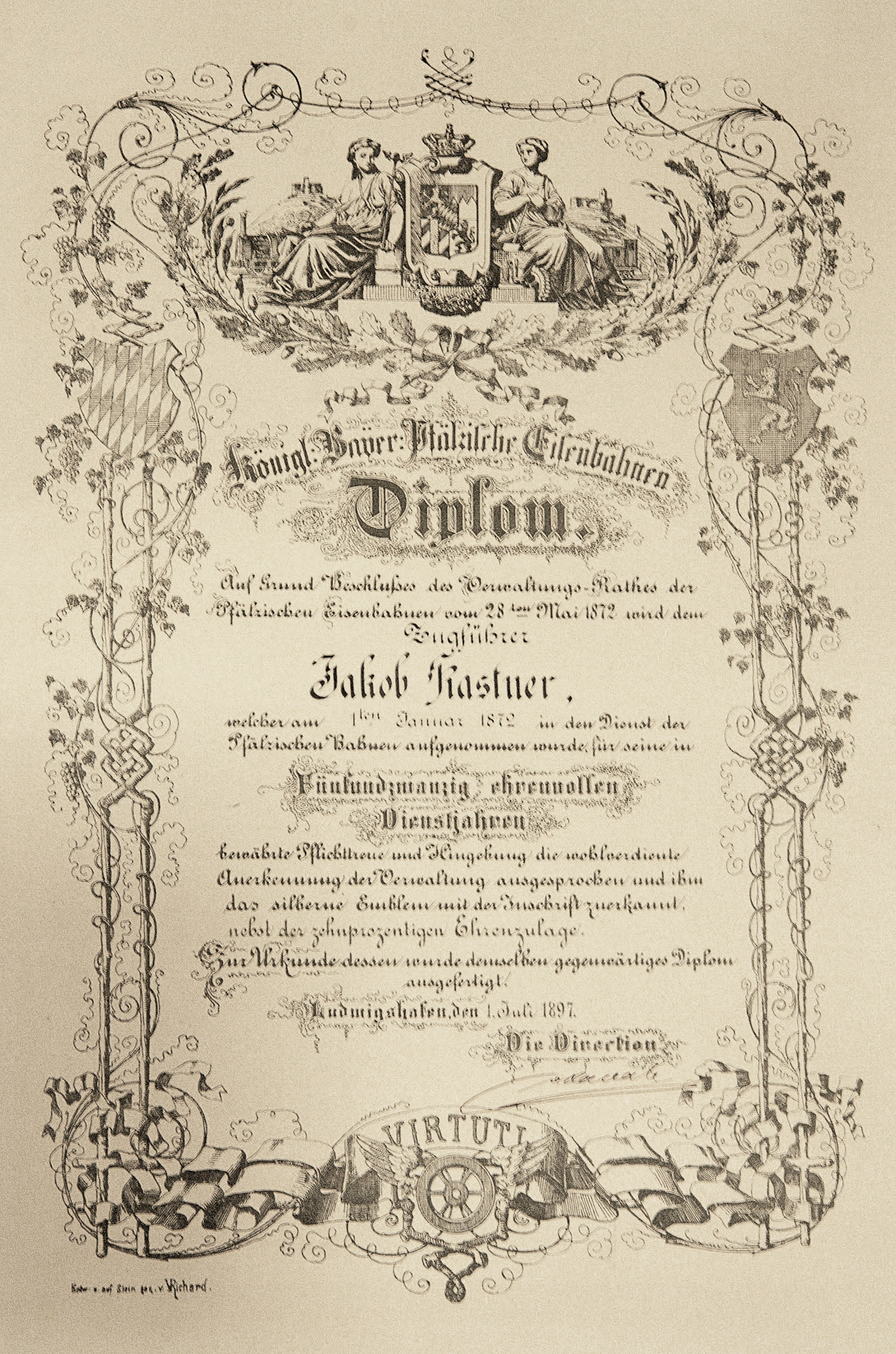 Ehrendiplom zum 25 Diestjubiläum